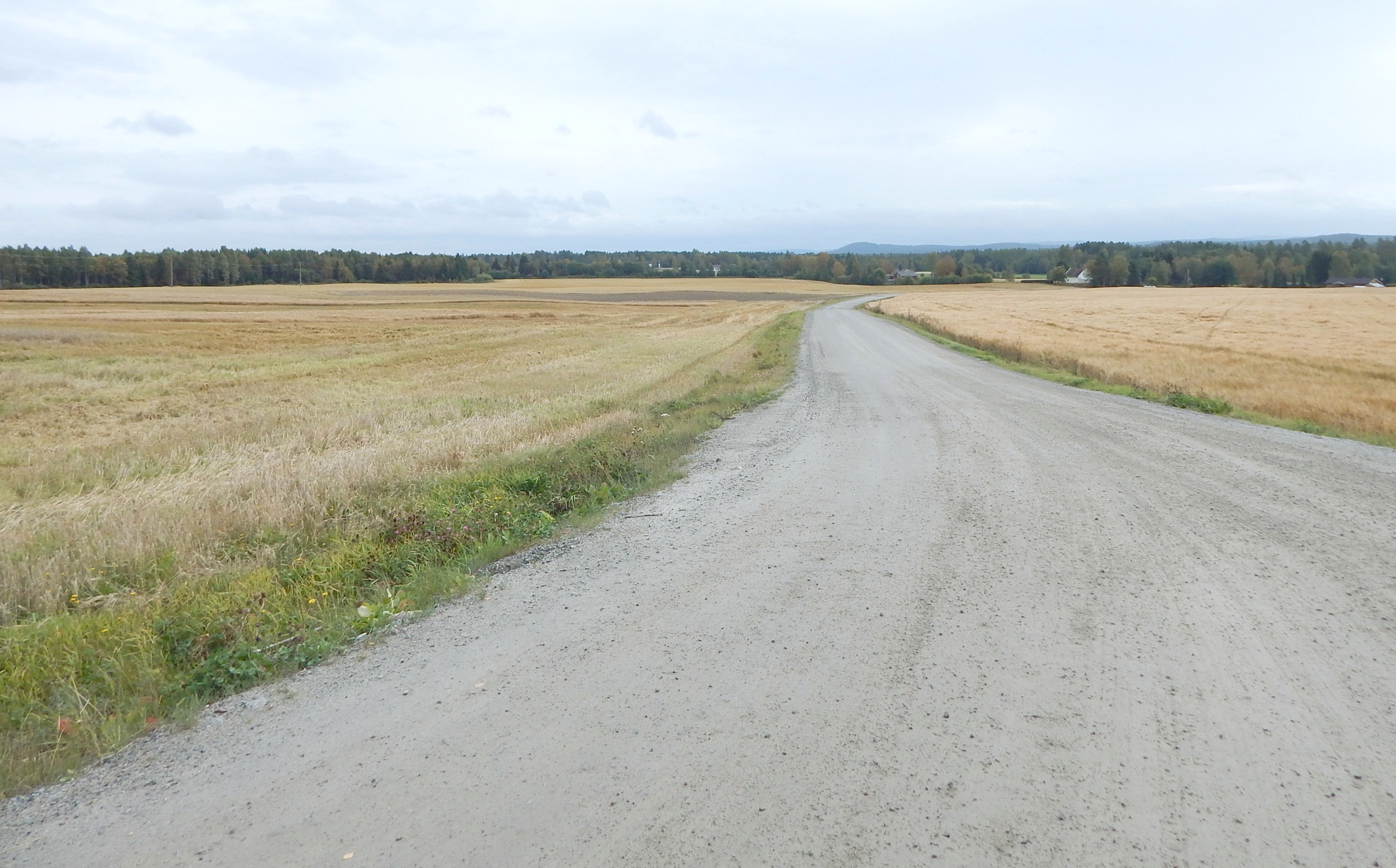 Kvennvegen (fylkesvei 1886, tidl. 165) sett fra Kjøstadvegen